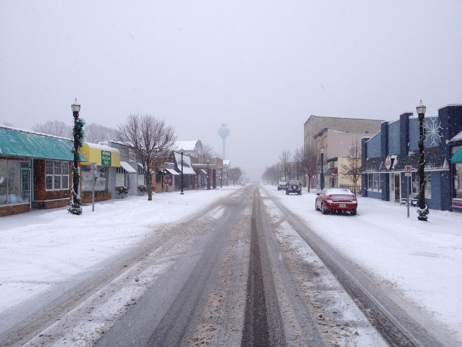 Ligure: O pàize de Pentwater d'inverno sotta a-a néive